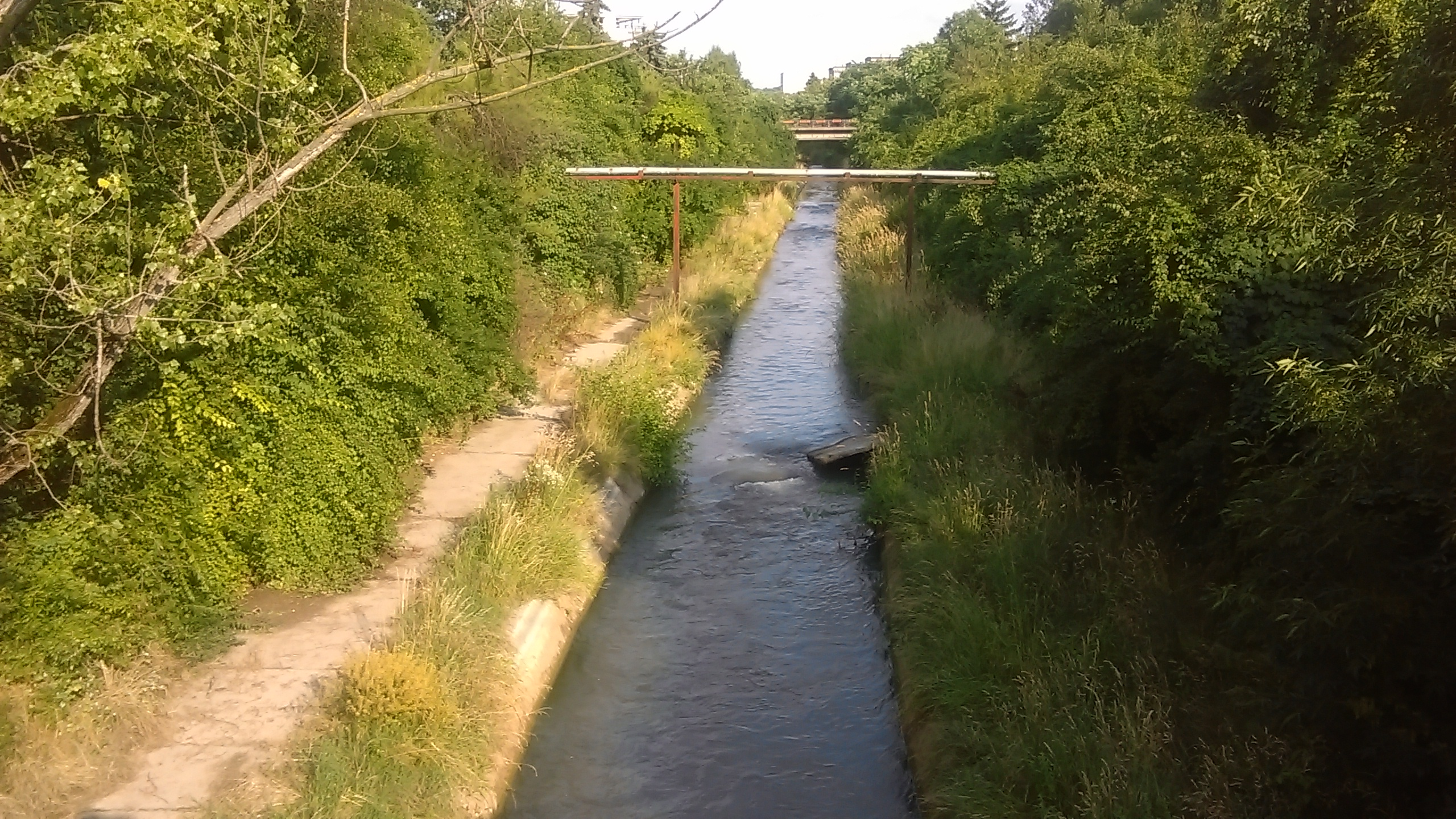 Изглед от изток по коритото на река Бели Лом, южно от Русенски Лом (природен парк).